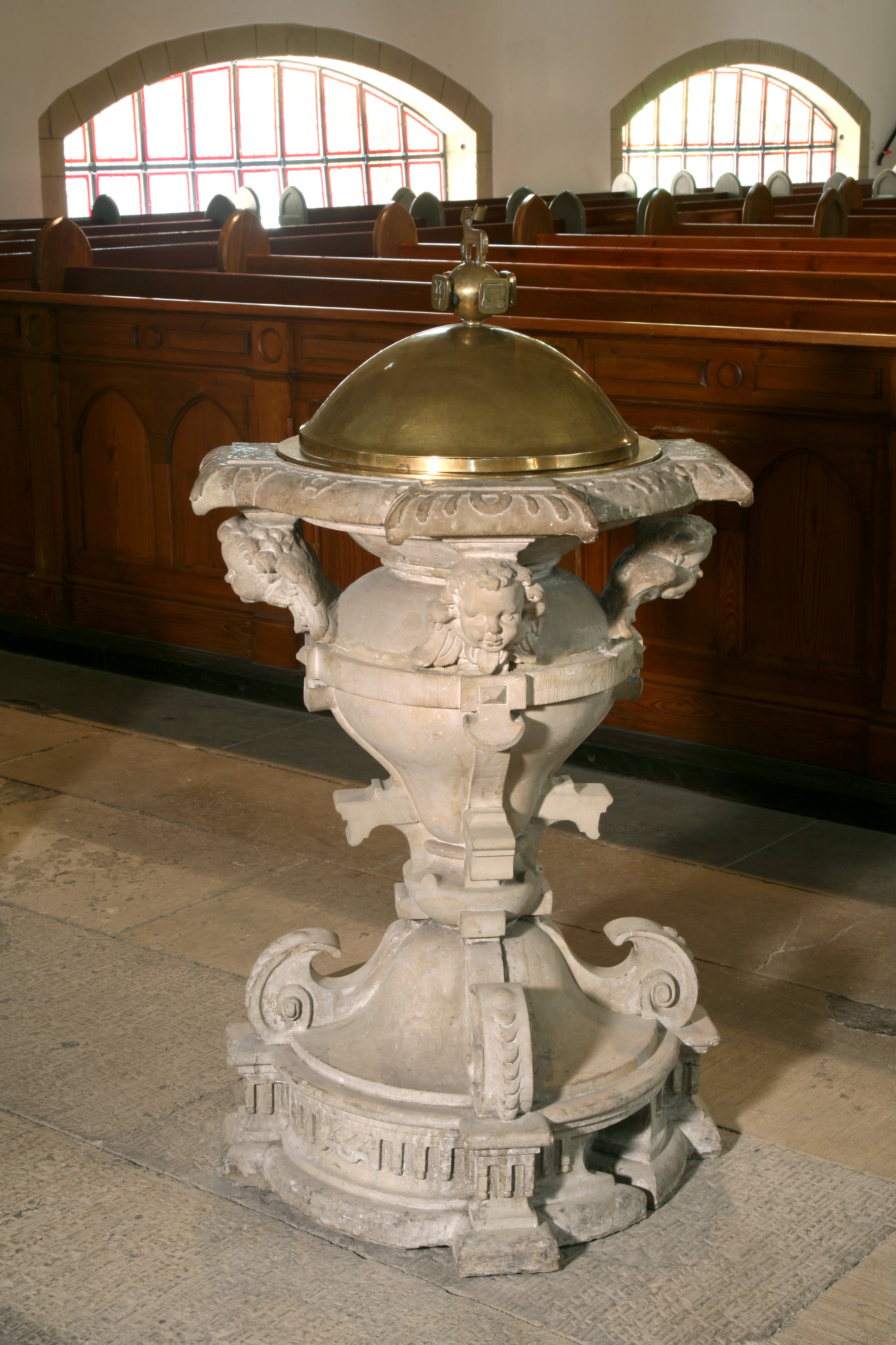 Taufstein in der Stiftskirche Obernkirchen